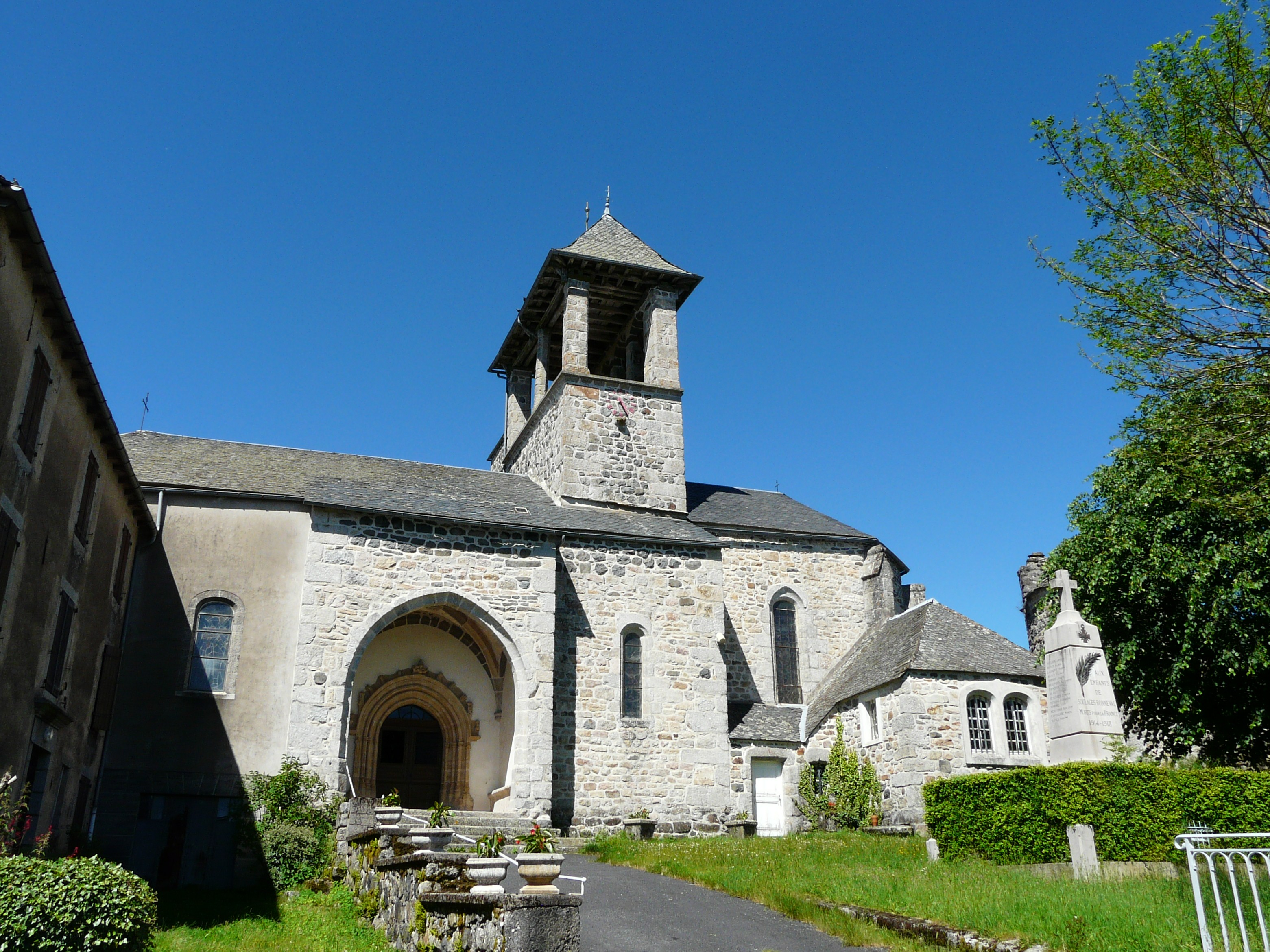 L'église de Soulages-Bonneval, Aveyron, France.